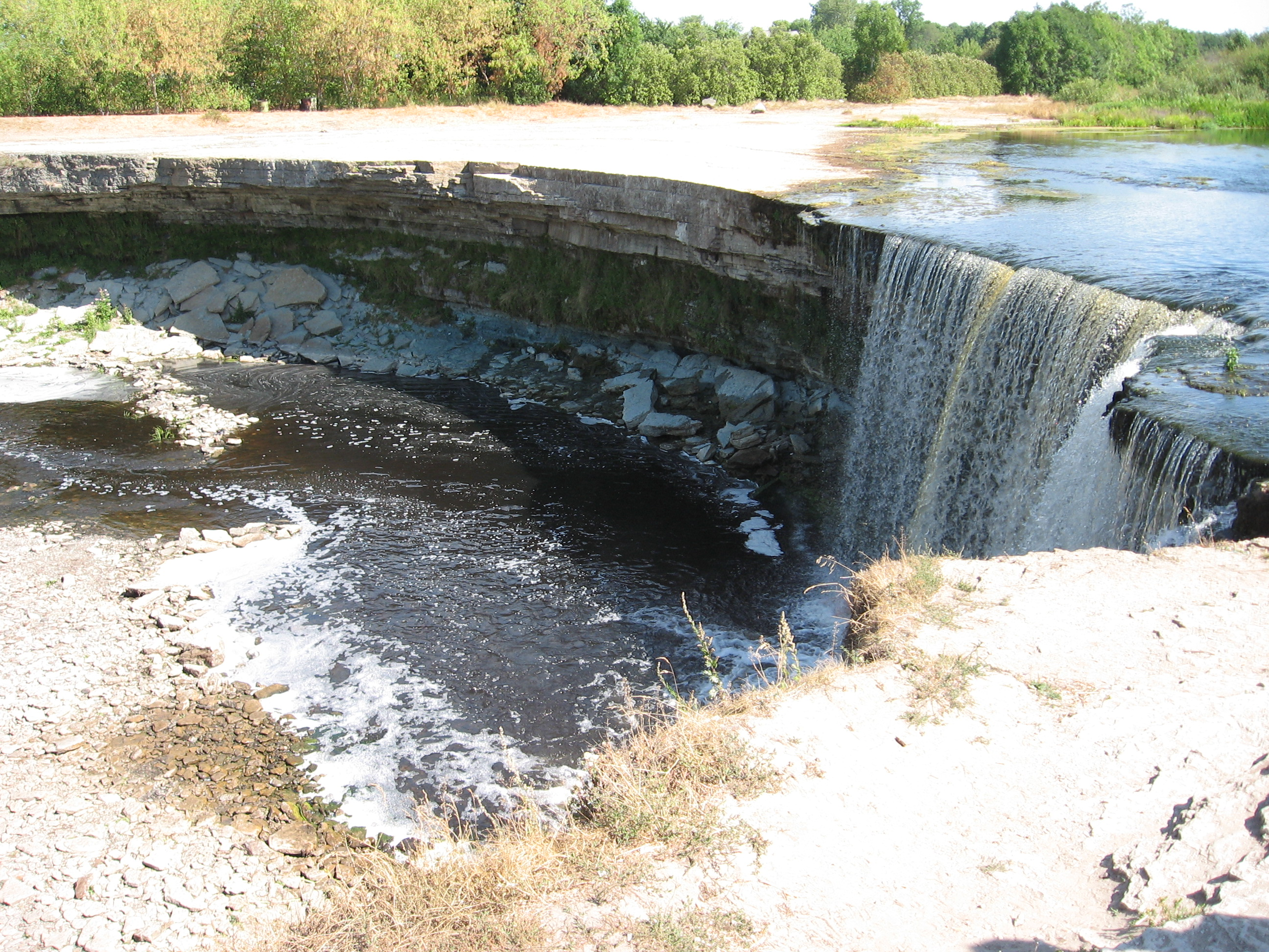 Jägala juga 8. augustil 2006